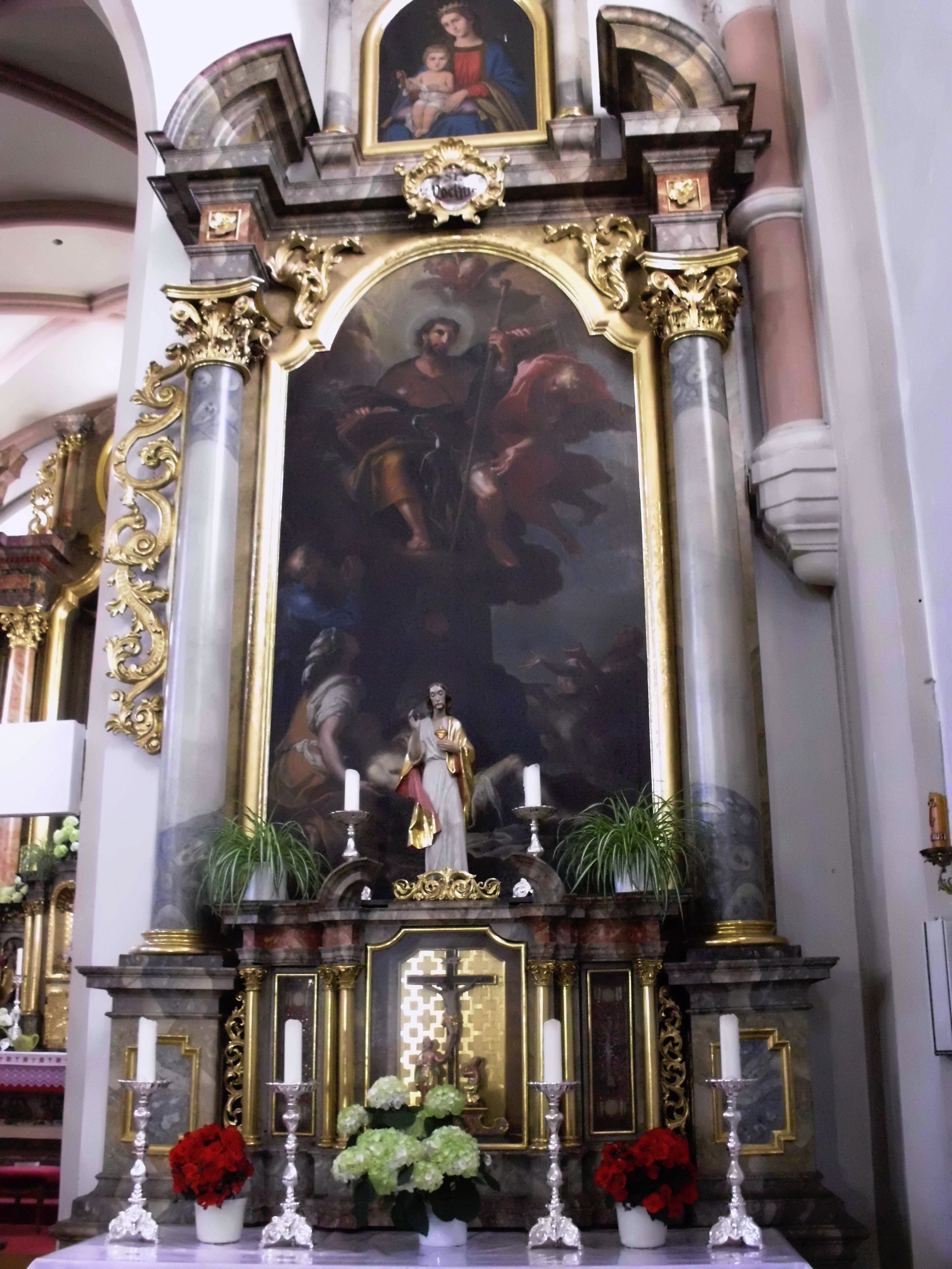 Oberdolling, Pfarrkirche St. Georg, südlicher Seitenaltar mit St. Rochus-Gemälde von Johann Kaspar Sing